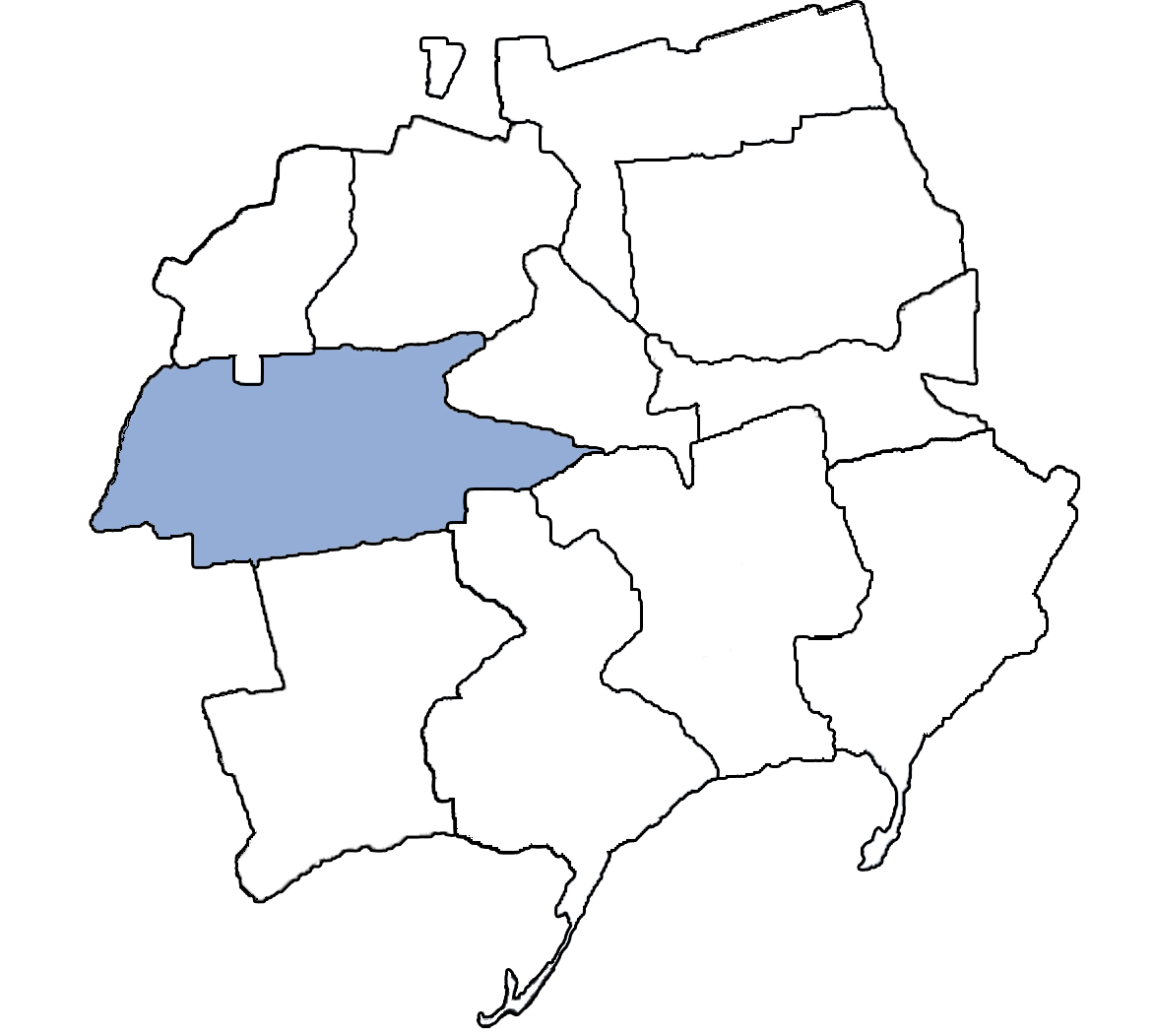 Карта Бердянської округи Молочанського району